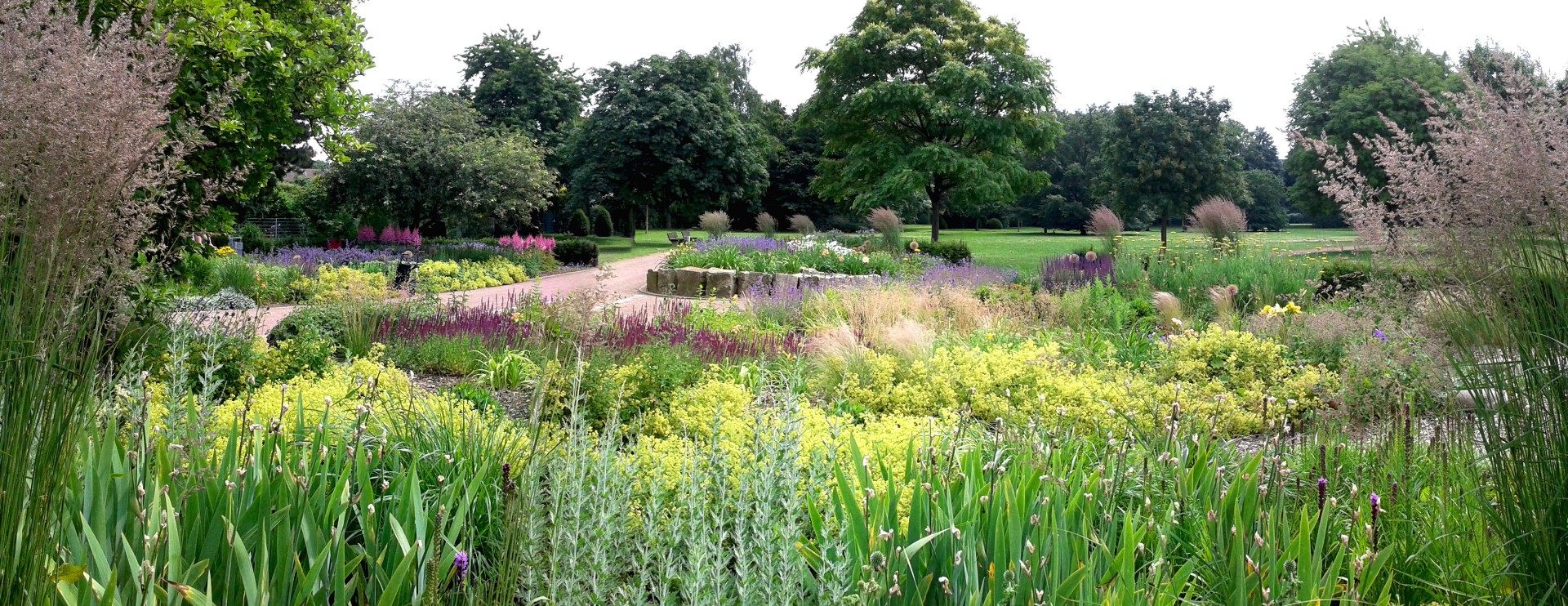 Tagliliengarten Panorama